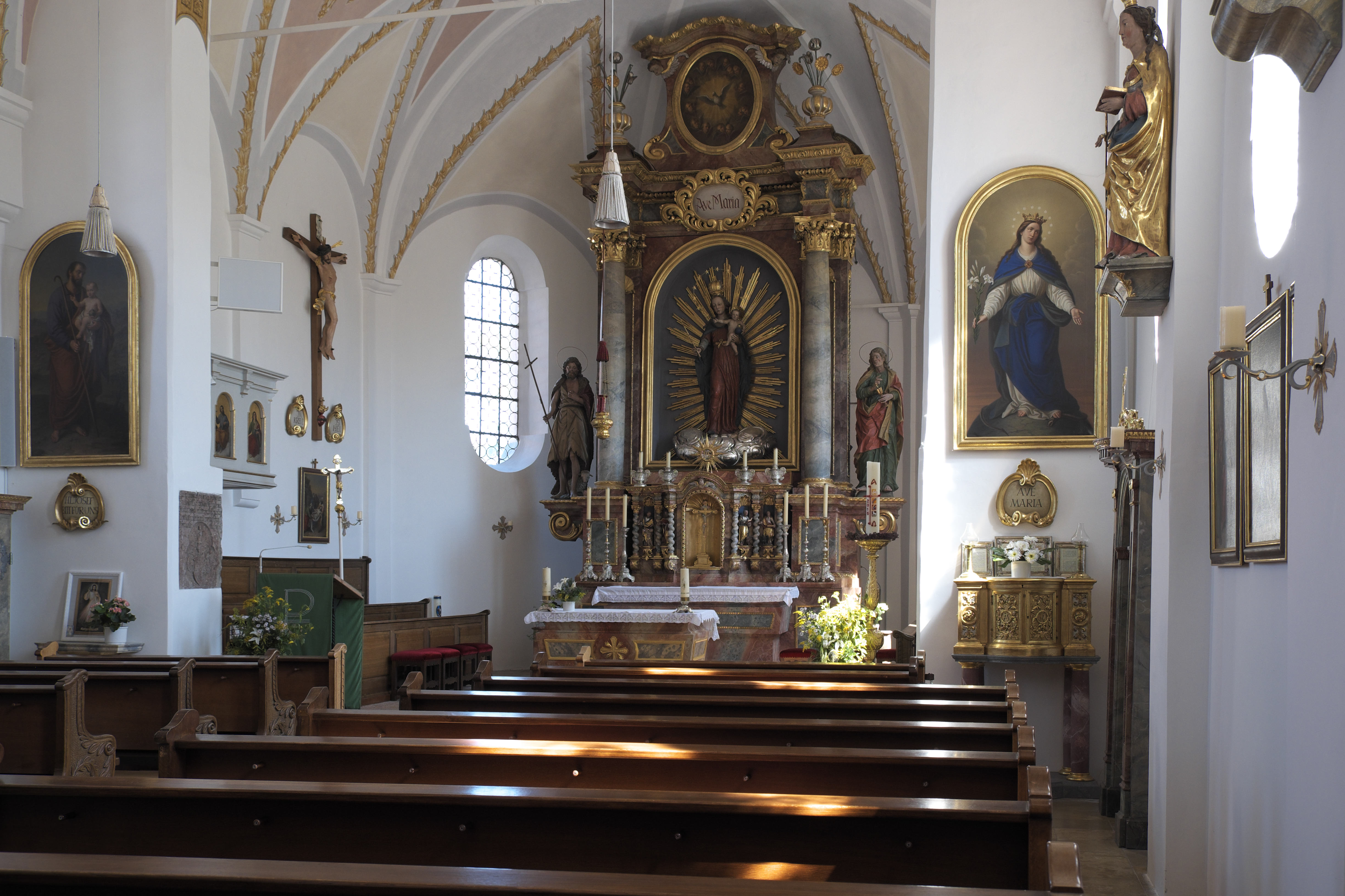 Katholische Pfarrkirche St. Johannes Baptist in Schöngeising im Landkreis Fürstenfeldbruck (Bayern/Deutschland)